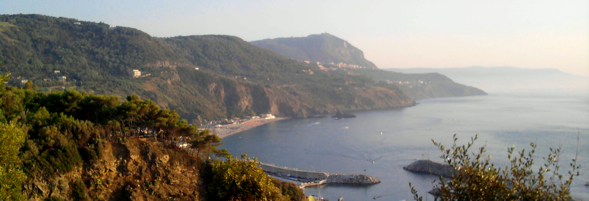 Panorama del Lido di Palmi